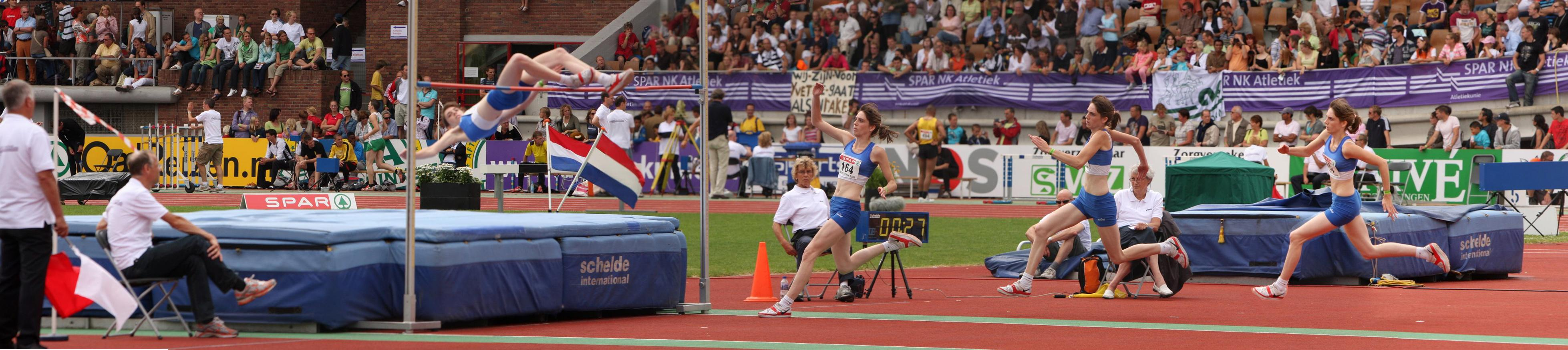 NK 2008